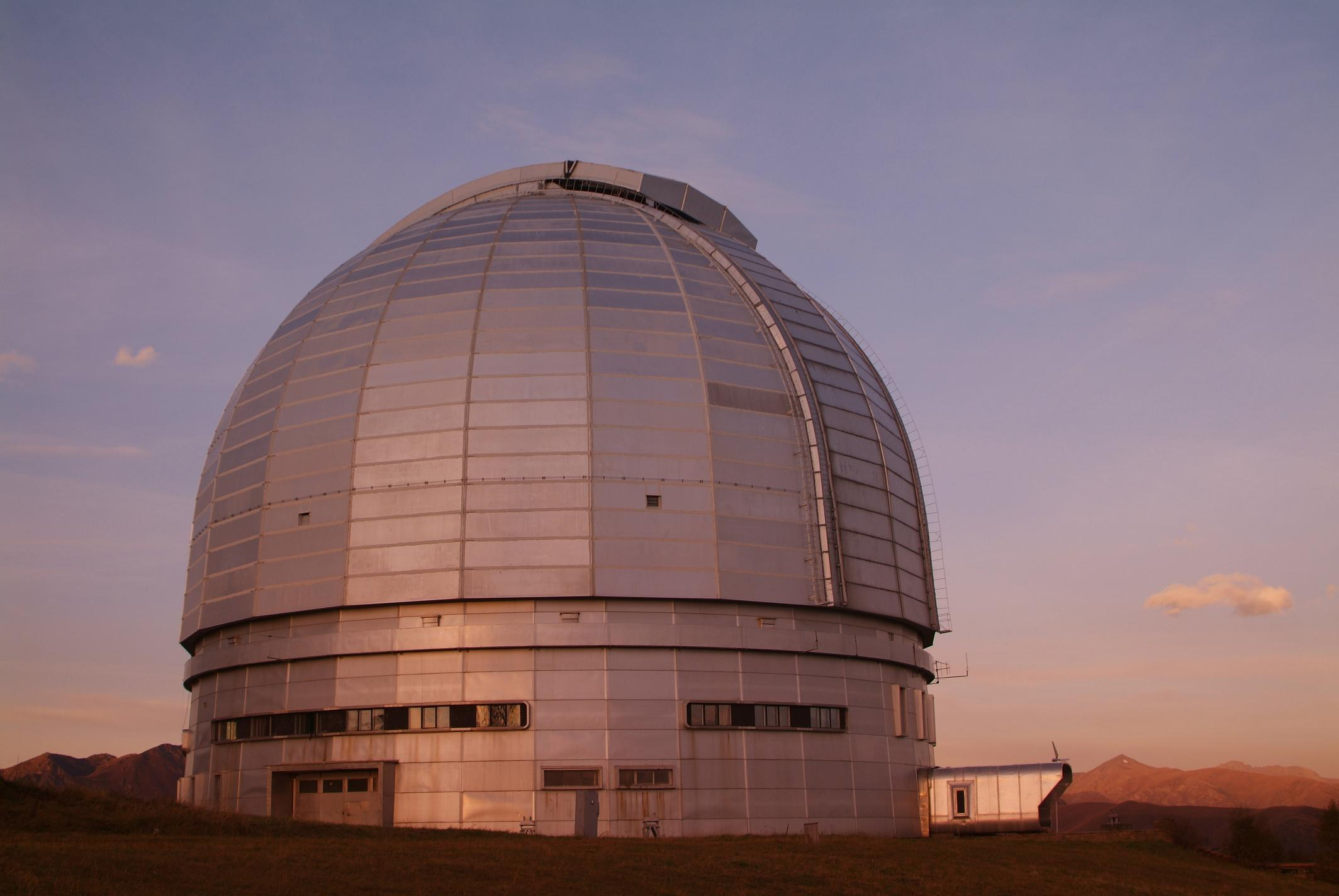 Большой телескоп Альт-азимутальный (телескоп БТА) с зеркалом диаметром 6 метров в Специальной астрофизической обсерватории РАН.